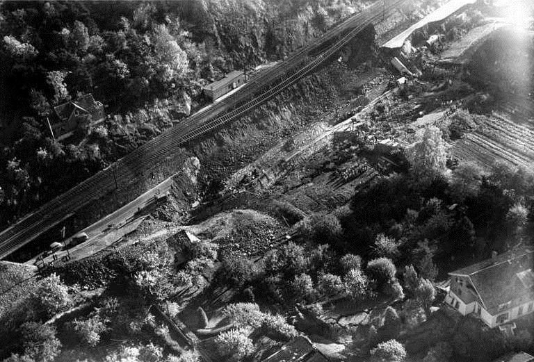 Leirras på Bekkelaget, Oslo 7. oktober 1953. Mosseveien og Østfoldbanen raste ut.